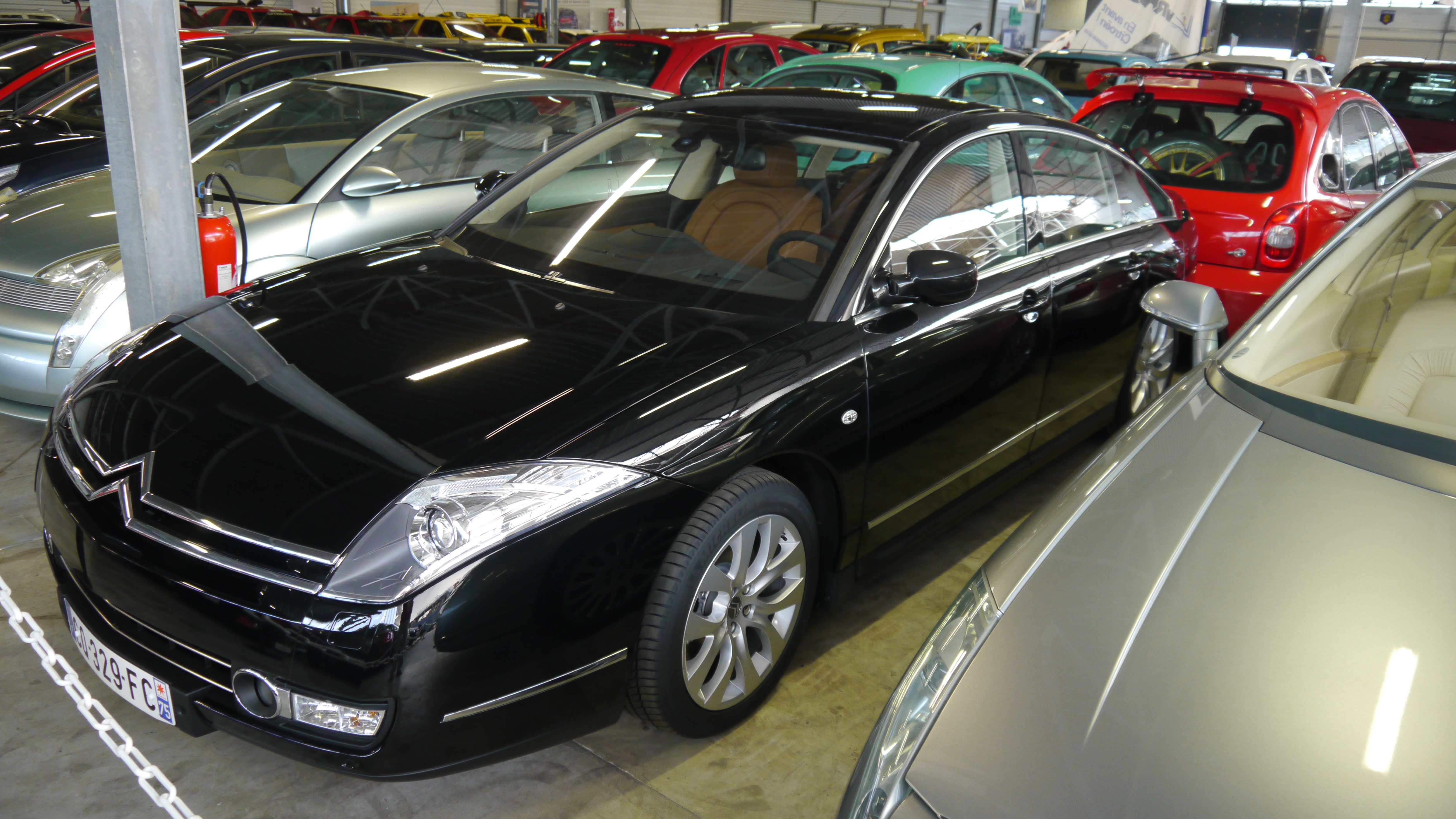 Conservatoire Citroen 234 Citroen C6